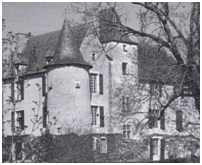 Château de Cénac, Sainte-Croix